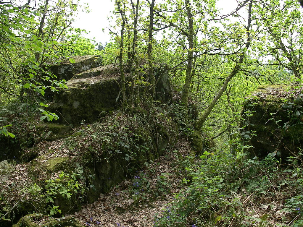 Pierre druidique de Becquerel à Périgny (Calvados)